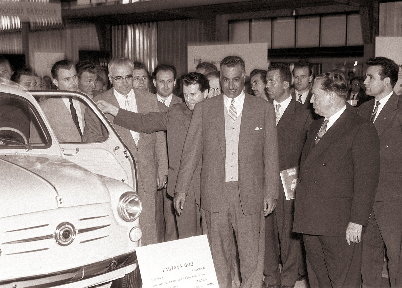 Tito in Naser na razstavi motorjev in motornih vozil na Gospodarskem razstavišču v Ljubljani.